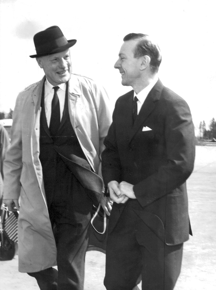 Kanadas norra områden och motsvarande svenska landskap har många problem gemensamma. Stora avstånd, minoriteter och utbyggningen av vattenkraften innebär sociala problem av stora mått. Det är därför synnerligen intressant att studera hur ett land med likartade förhållanden har angripit dessa viktiga frågor, konstaterade mr Arthur Laing, Kanadas minister för "Norrlandsaffärer" och kraftförsörjning, då han på fredagen anlände till Arlanda i sällskap med sin hustru och sex medlemmar av sitt departement. "I våra norra områden lever omkring 12,000 eskimåer i större och mindre byar. Genom gruvdriften och den norra försvarszonen har denna befolkning kommit i kläm samhällsutvecklingsmässigt", sade mr Laing. Vår delegation hoppas att under besöket i Norrland komma i kontakt med de svenska samernas levnadsförhållanden. Intressant är också att se hur de svenska kraftverksbyggena socialt påverkat denna befolkningsgrupp och dess relationer till stat, kommun och annan befolkning. Mr Laing, som på Arlanda möttes av sekreterare Stig Brattström, UD, och Kanadas chargé d'affaires O. A. Christoff skall under Sverigebesöket bland annat besöka Kiruna, Gällivare, Porjus och Luleå samt avlägga visit hos handelsminister Gunnar Lange.